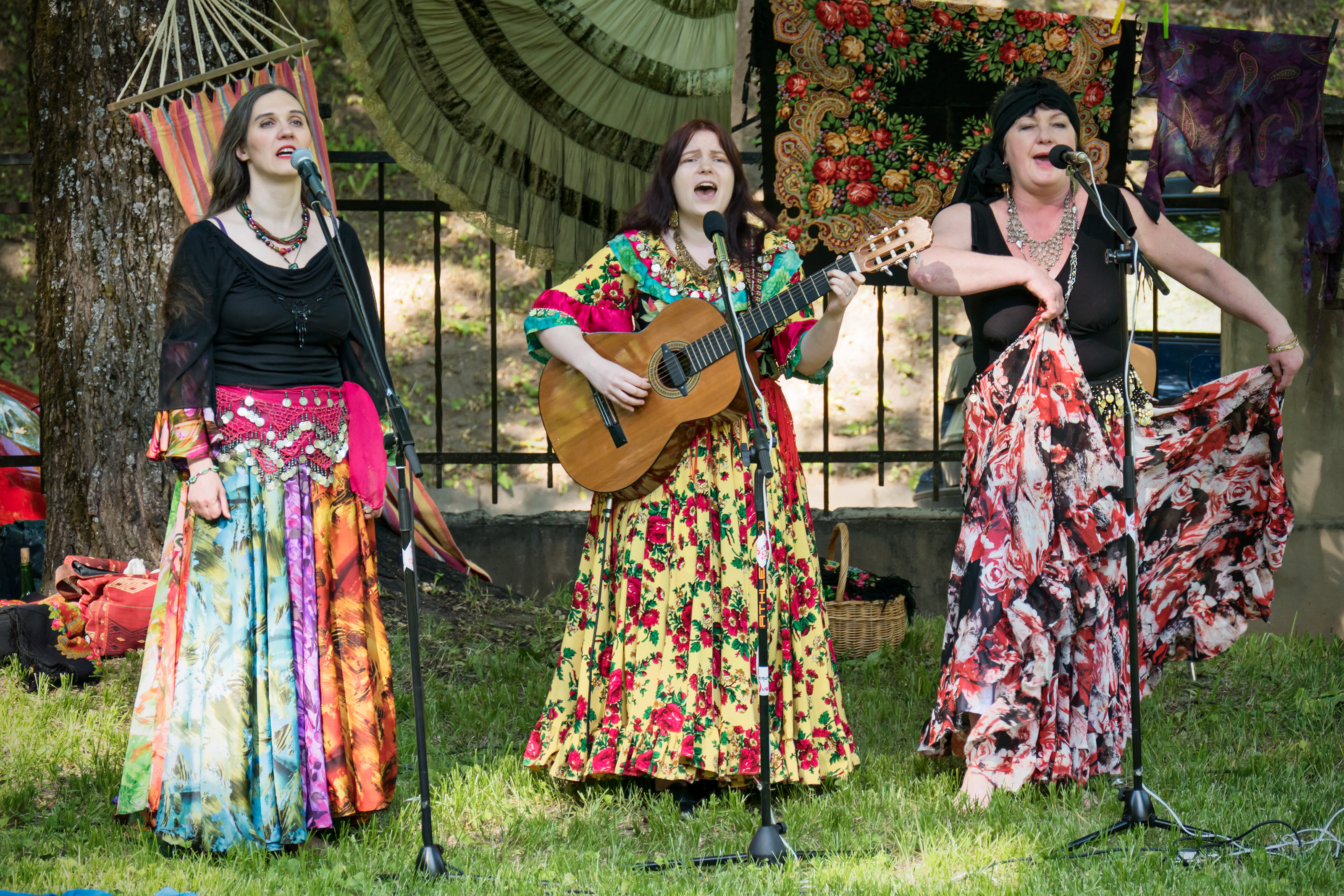 Maljarka lauljad: Külli Kressa, Annika Rahnu, Aino Kartul-Najar.